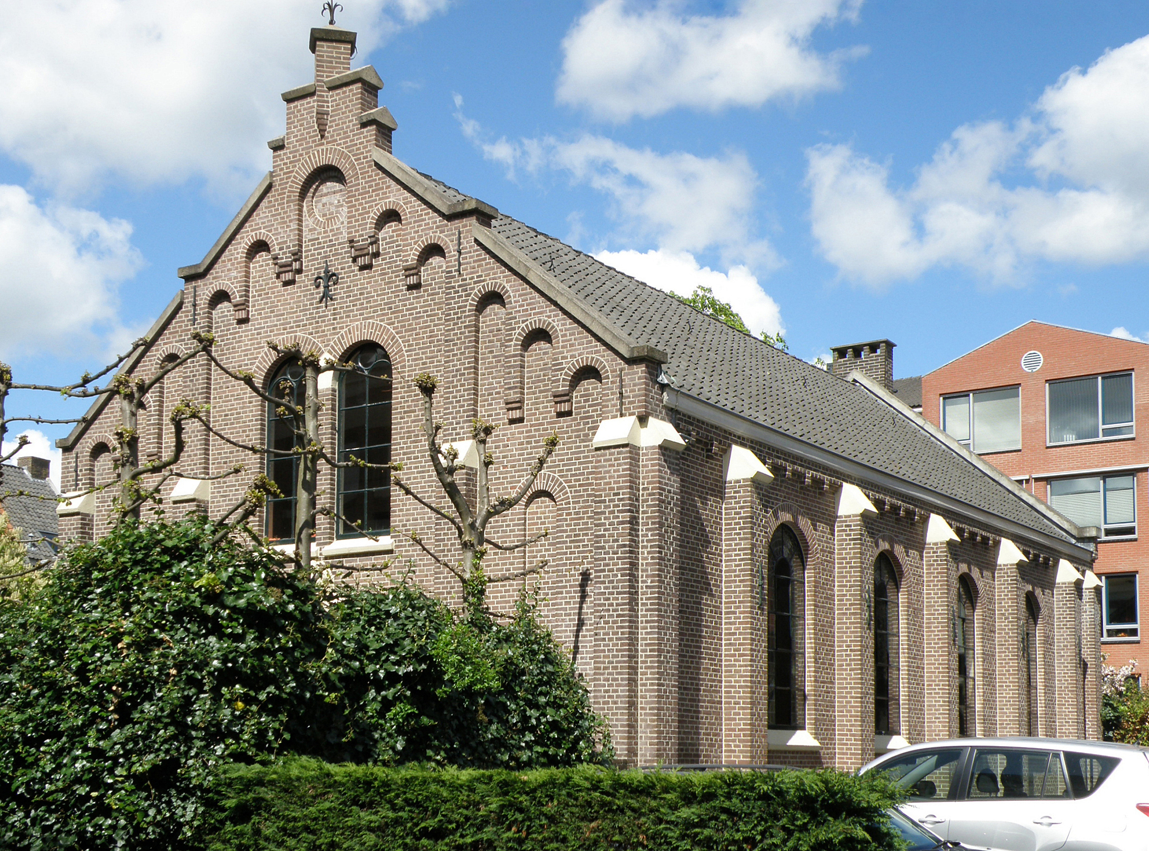 Amersfoort (prov. Utrecht, Nederland). Remonstrantse kerk, Herenstraat nr.80.